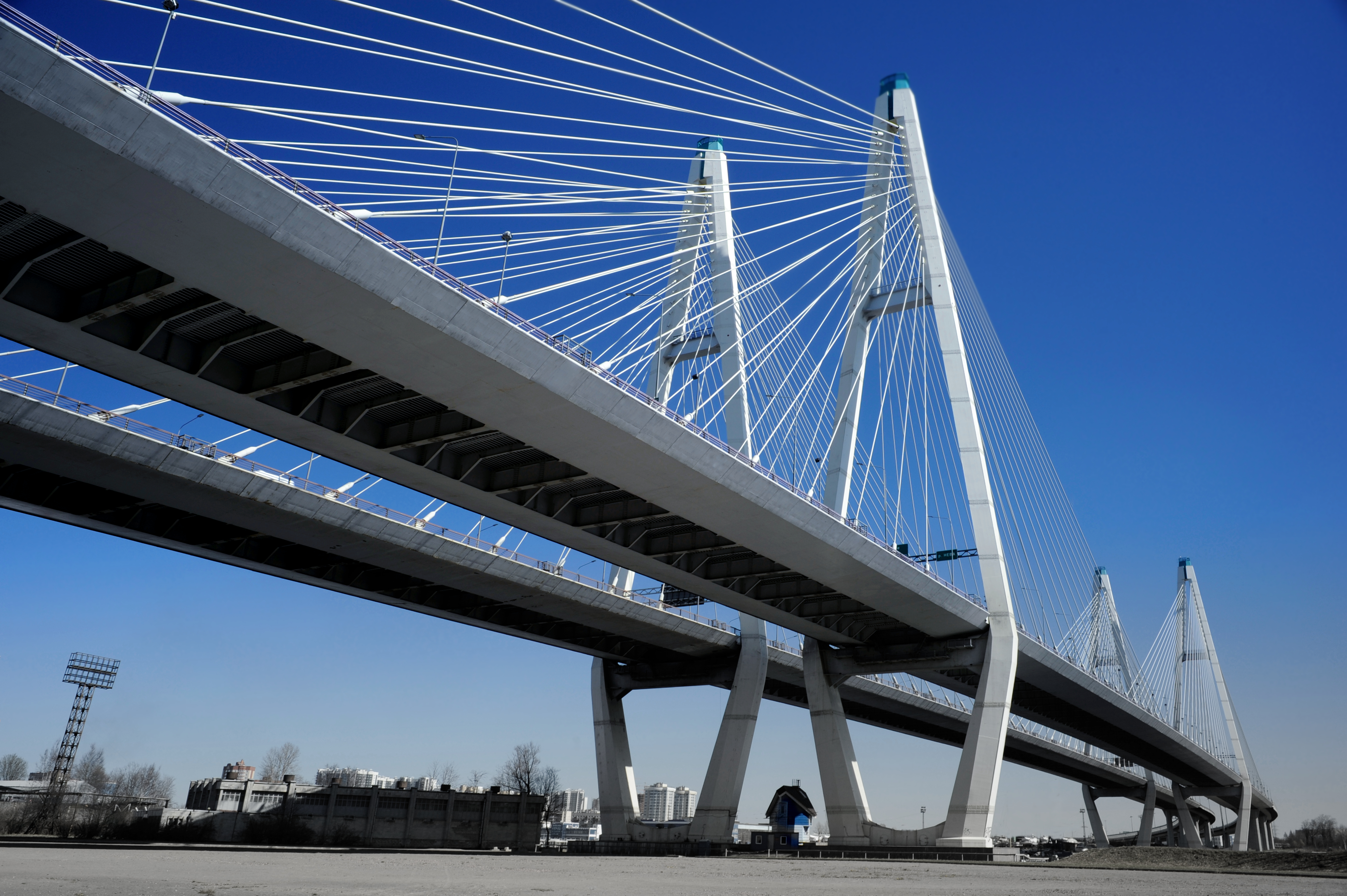 Полет